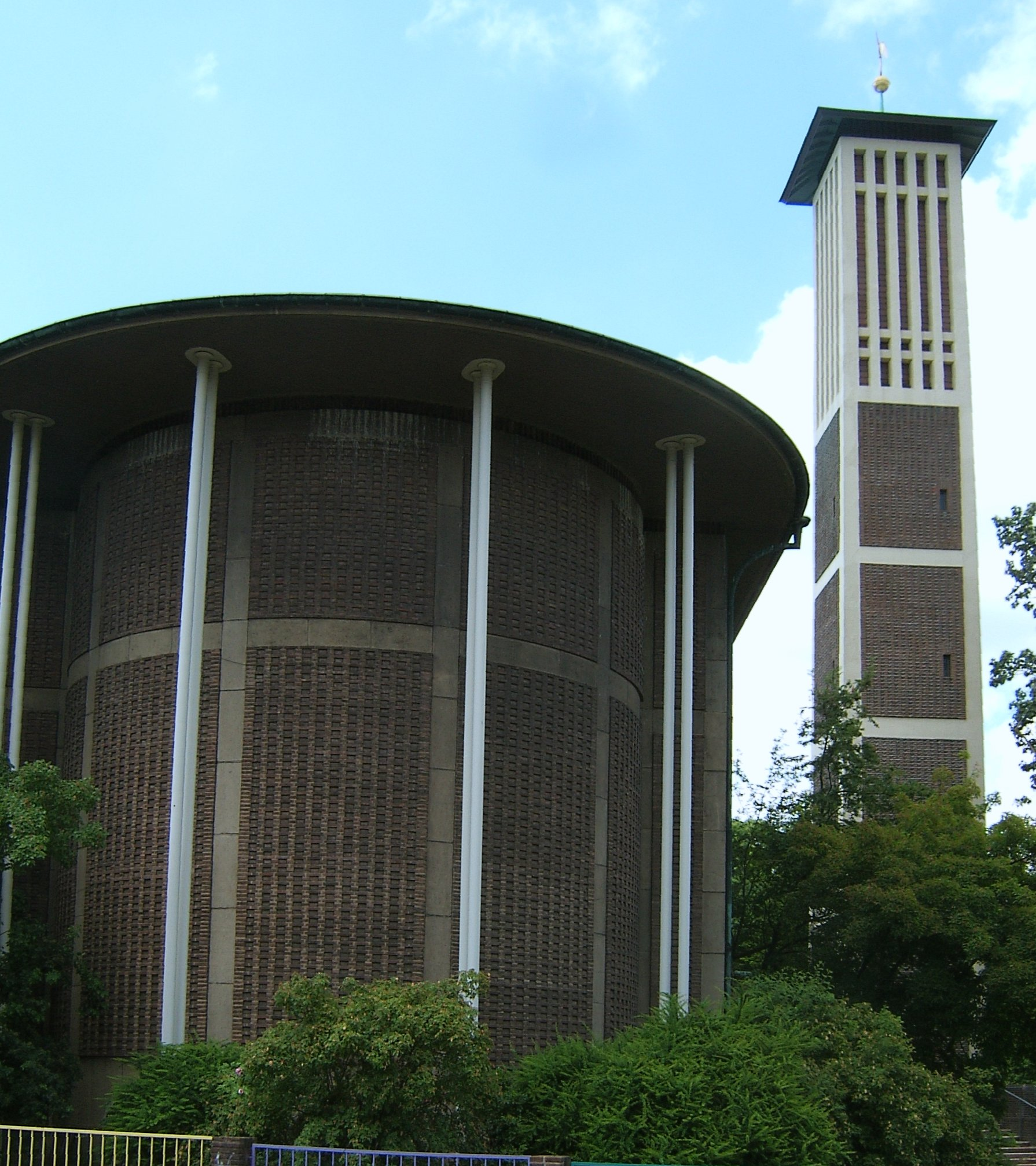 Bildbeschreibung: Hamburg, Bahrenfeld, Paul-Gerhardt-Kirche Fotograf: selbst Datum 1.7.2006